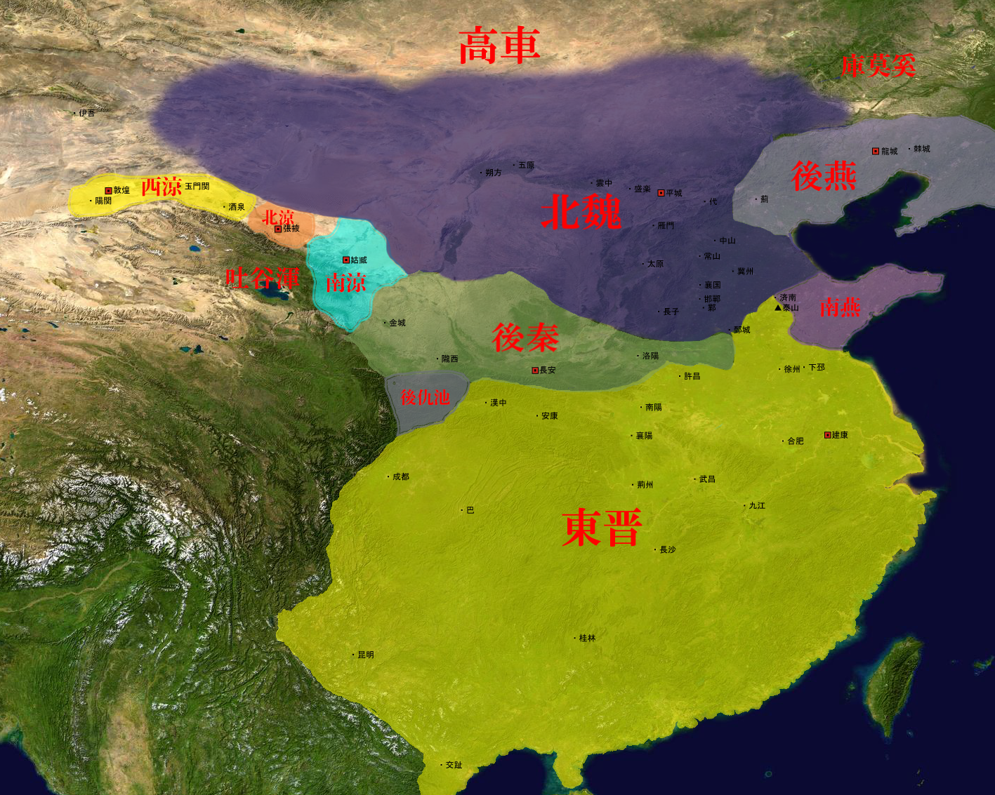 403年頃の五胡十六国時代の地図